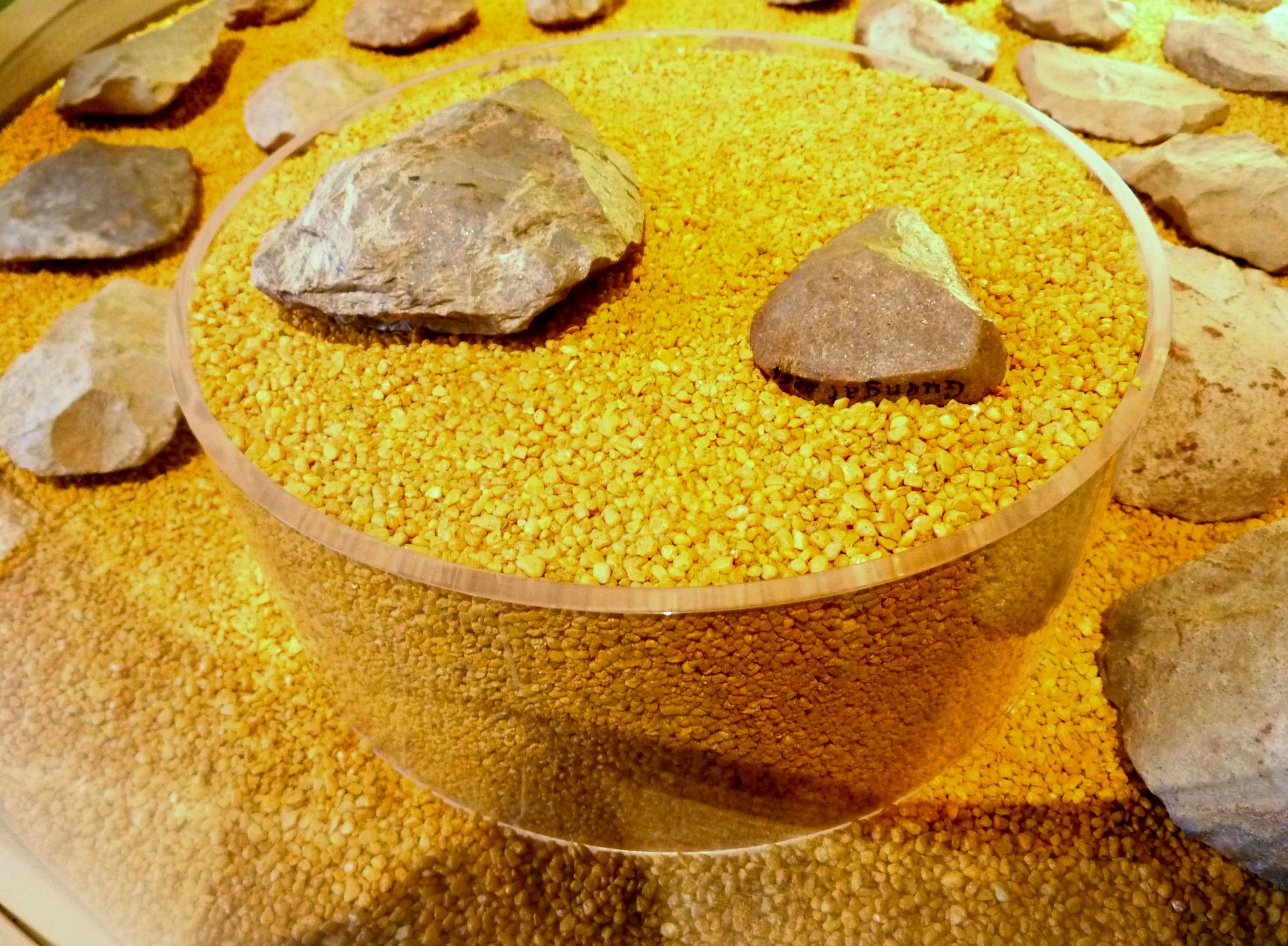 Guengat : deux bifaces datant de l'acheuléo-moustérien trouvés sur le site de Kervouster, datant d'environ 80 000 ans (Musée d'histoire et d'archéologie de Vannes)